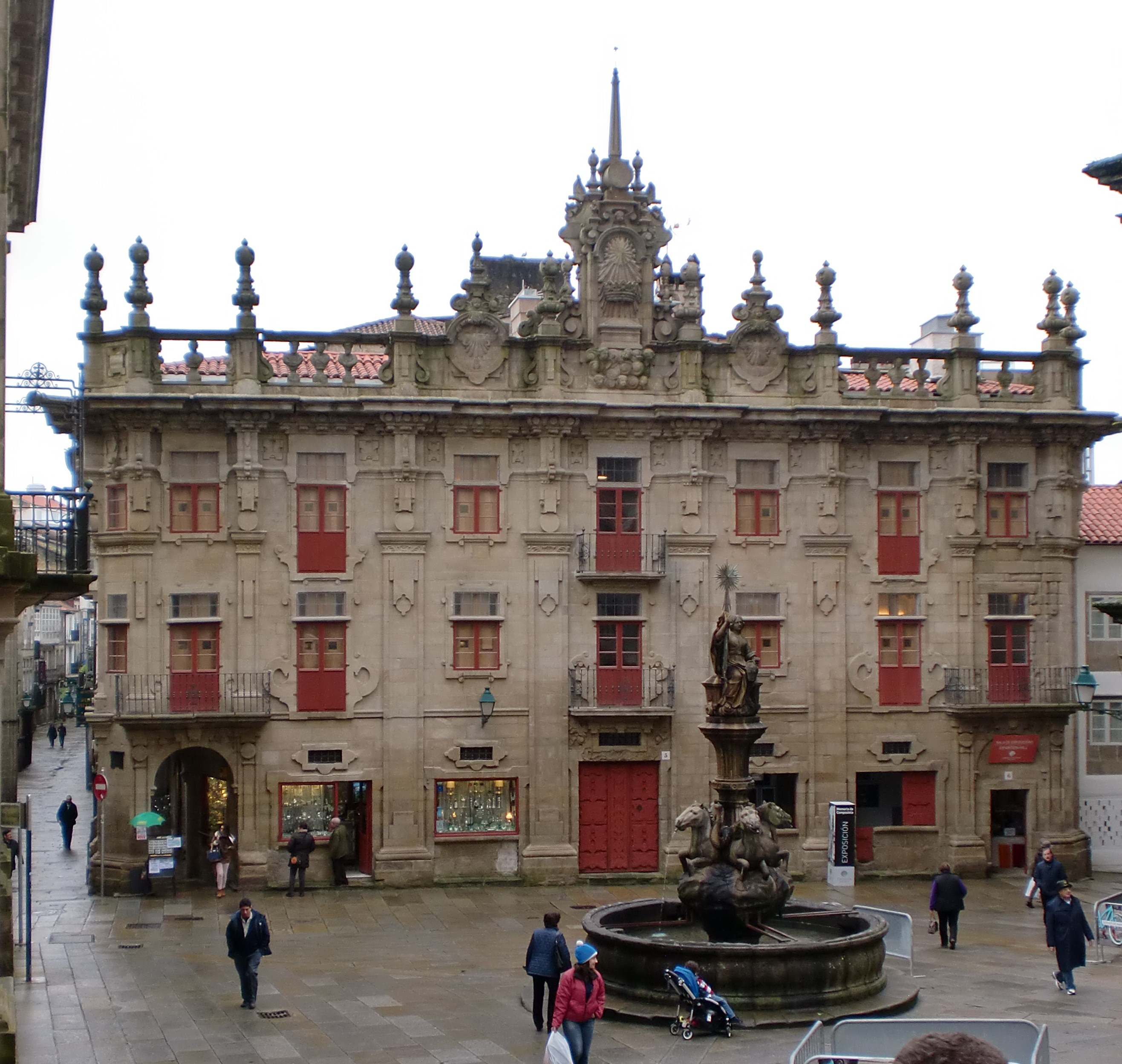 Casa do Cabido, Santiago de Compostela.